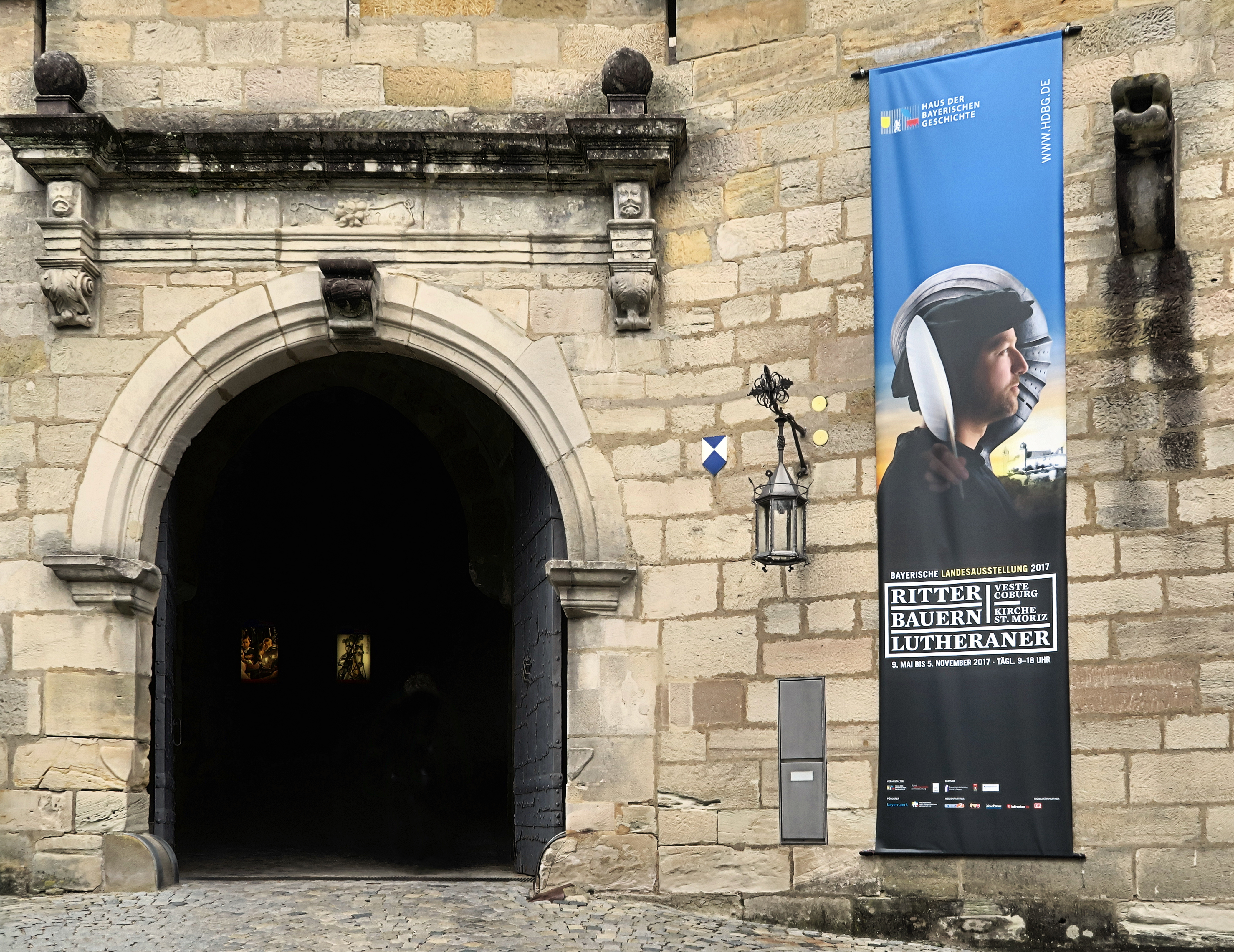 Bayerische Landesausstellung 2017 auf der Veste Coburg anläßlich des 500. Lutherjubiläums unter dem Titel "Ritter, Bauern, Lutheraner", Haupteingang zur Veste